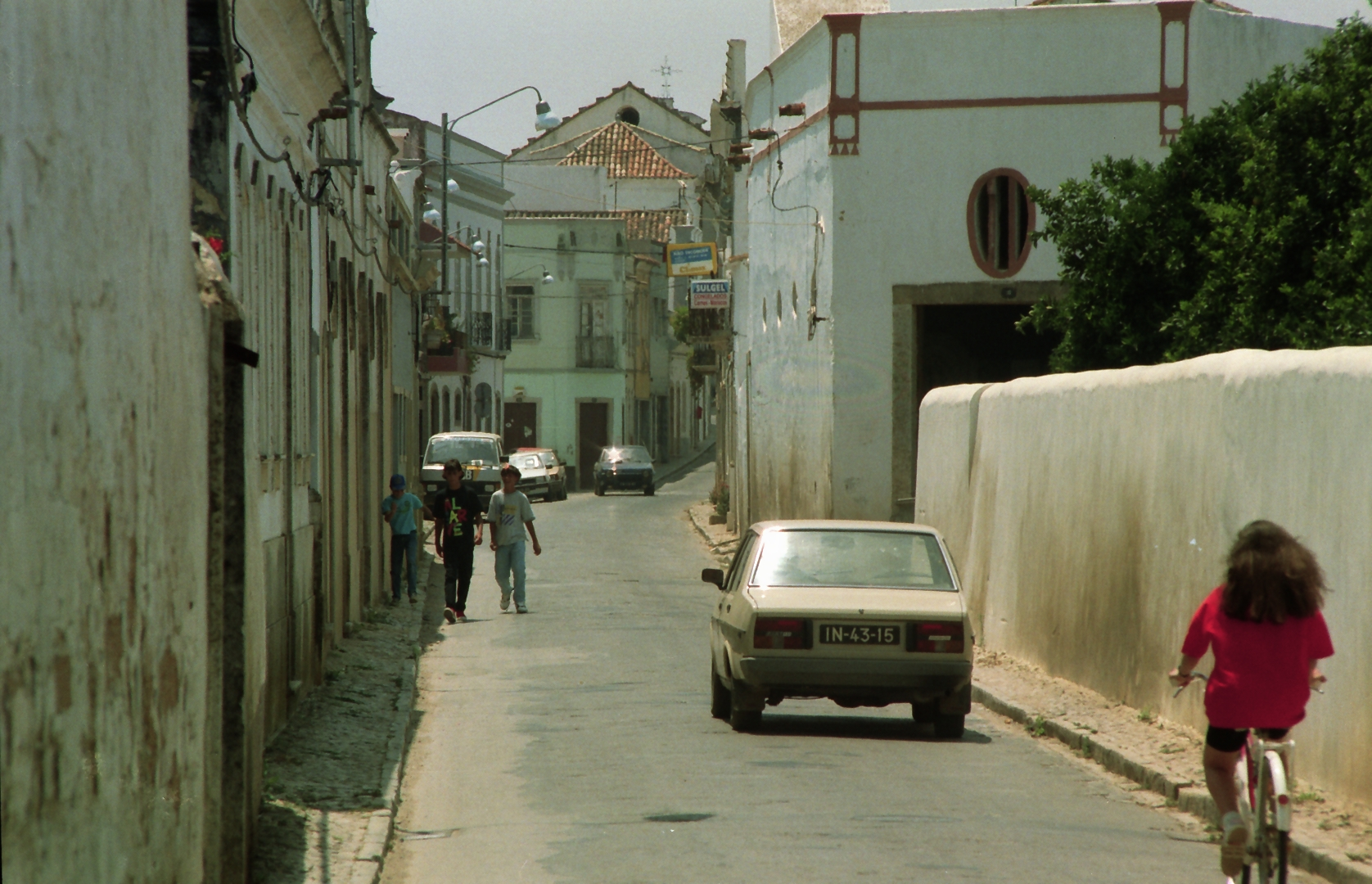 Portugal - Algarve: Moncarapacho, Hauptstraße